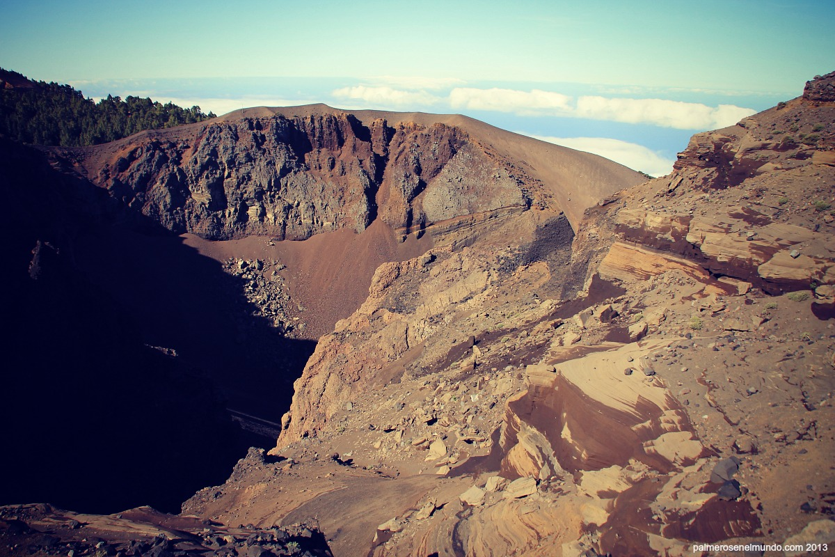 San Juan Vulcano